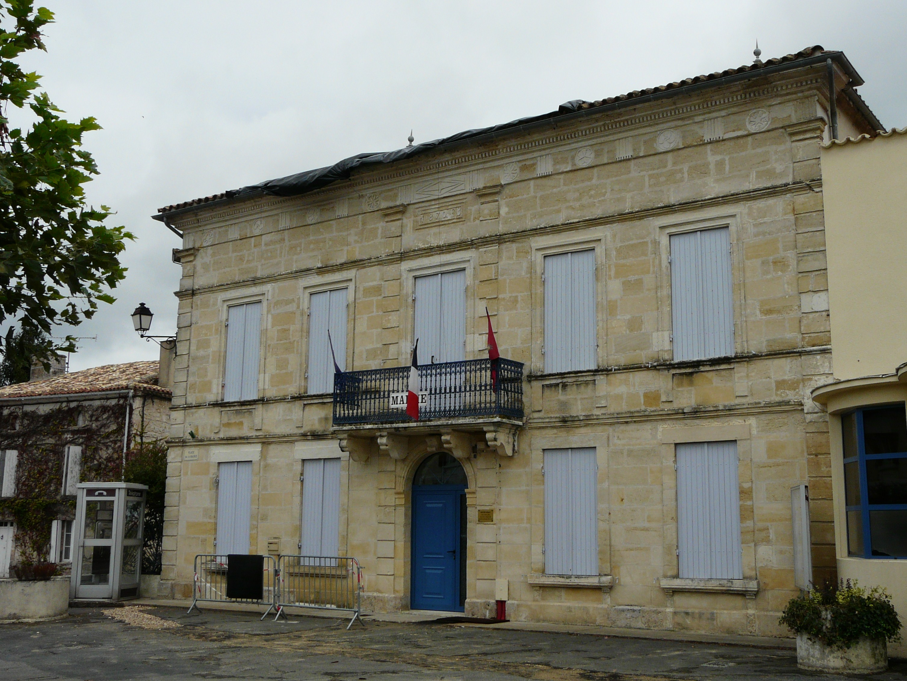 La mairie de Saint-Martin-de-Gurson, Dordogne, France.